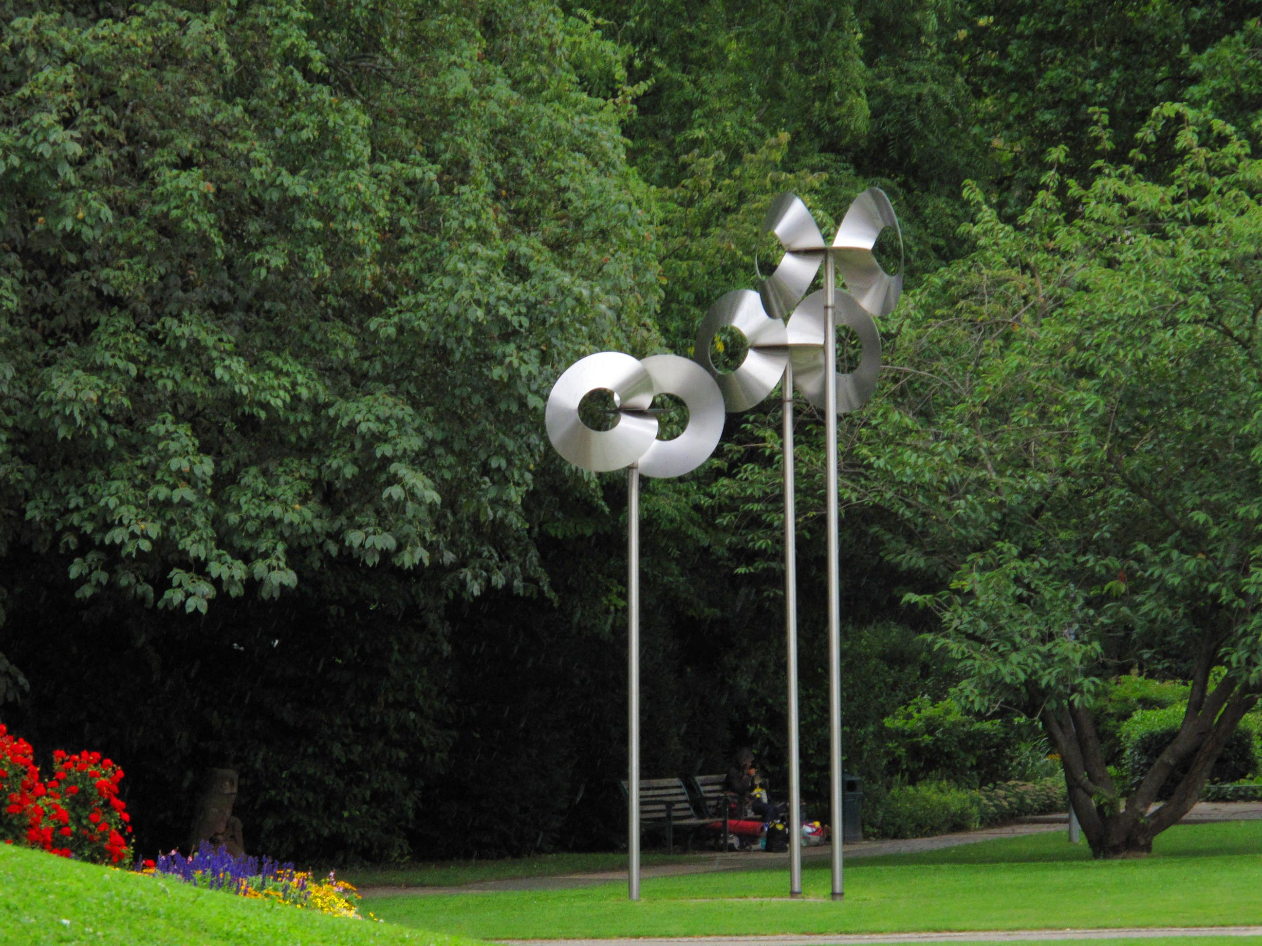 Roland Phleps, Windspiel, 2000, - Deutschland, Baden-Württemberg, Freiburg im Breisgau, Stadtgarten